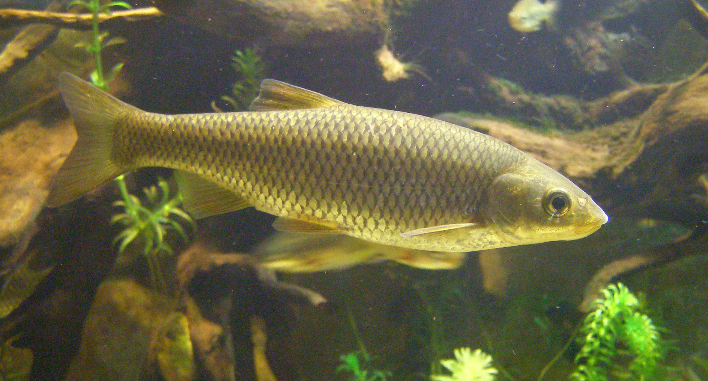 Squalius carolitertii (Doadrio, 1988).